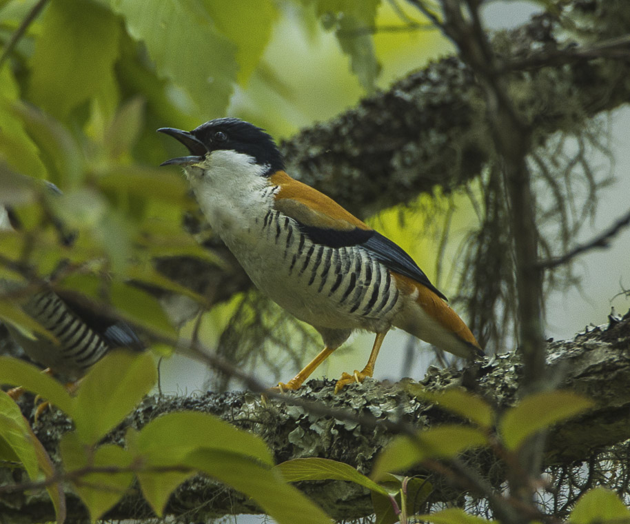 Cutia - Bhutan_S4E0752